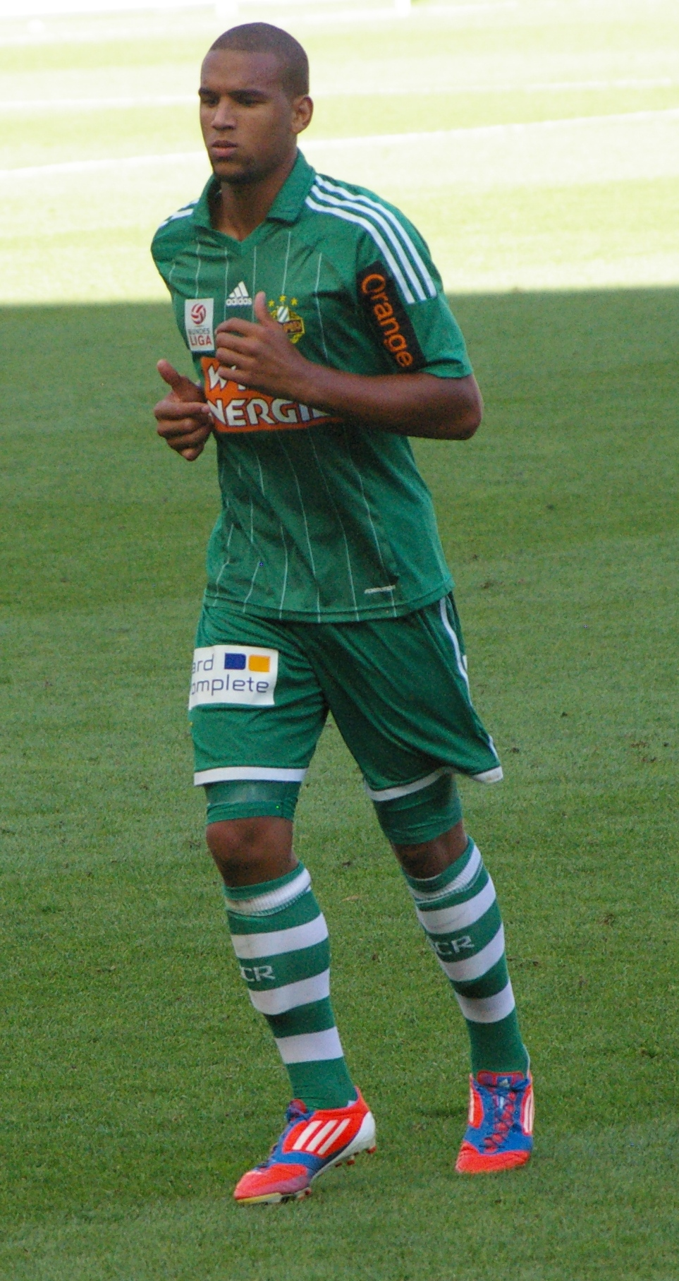 striker SK Rapid Wien